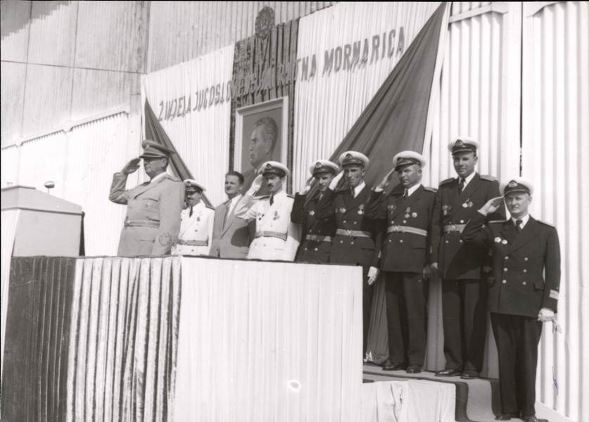 Srpski (latinica): Proslava dana JRM, Divulje, 10. septembar 1951